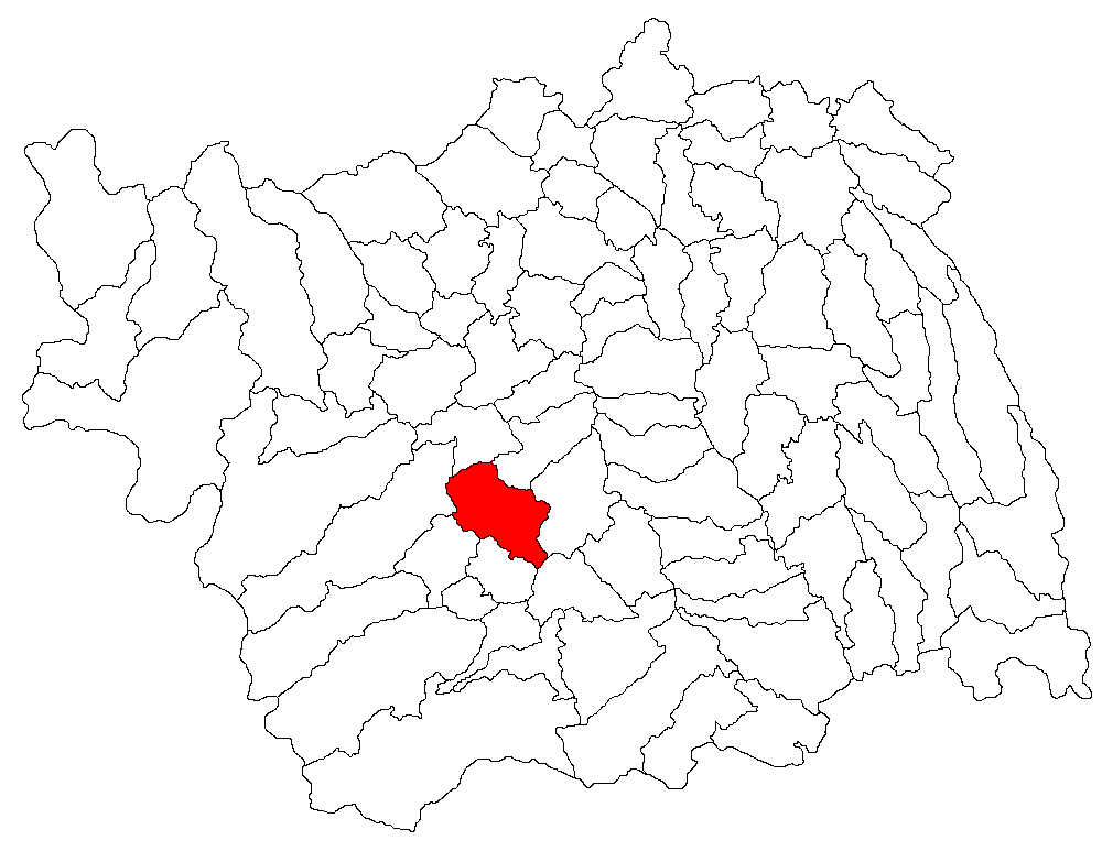 Categorie:Hărţi ale judeţului Bacău